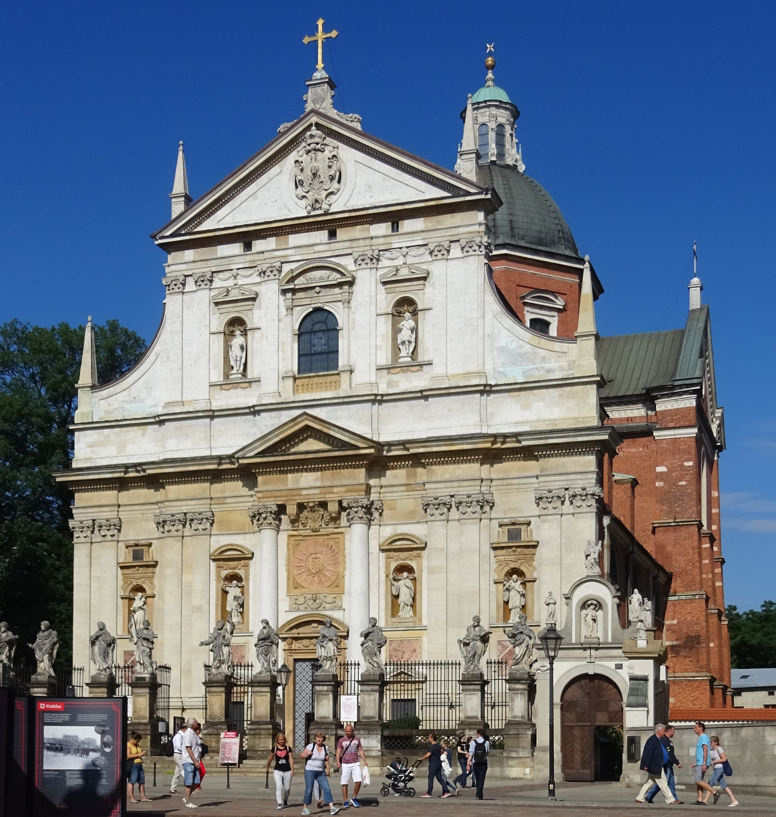 Kościół Świętych Apostołów Piotra i Pawła w Krakowie - widok frontu z Placu Marii Magdaleny.